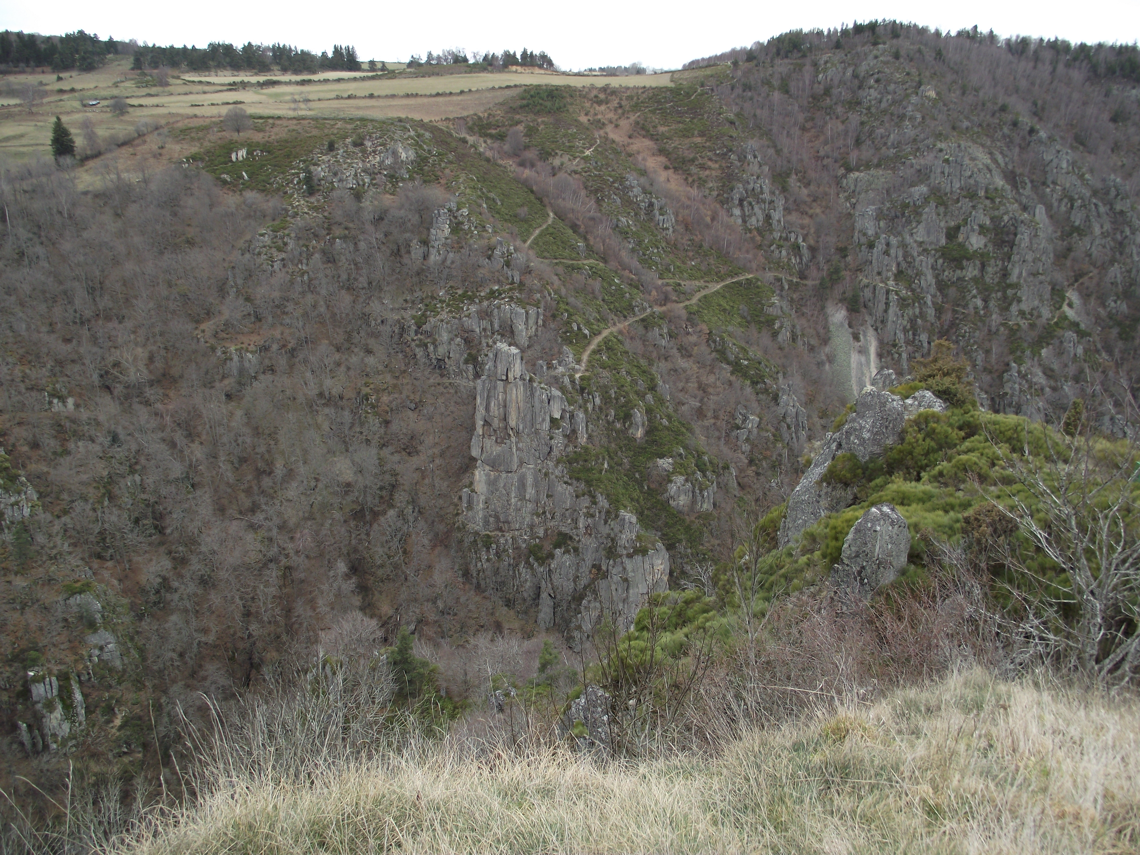 Gorges du Bès vues d'Arzenc d'Apcher (Lozère, France)